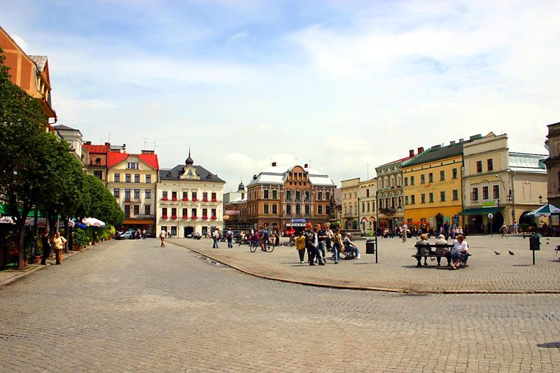 Cieszyn (Poland)